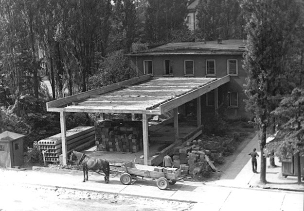 Rozbudowa zakładu. 1970 rok.